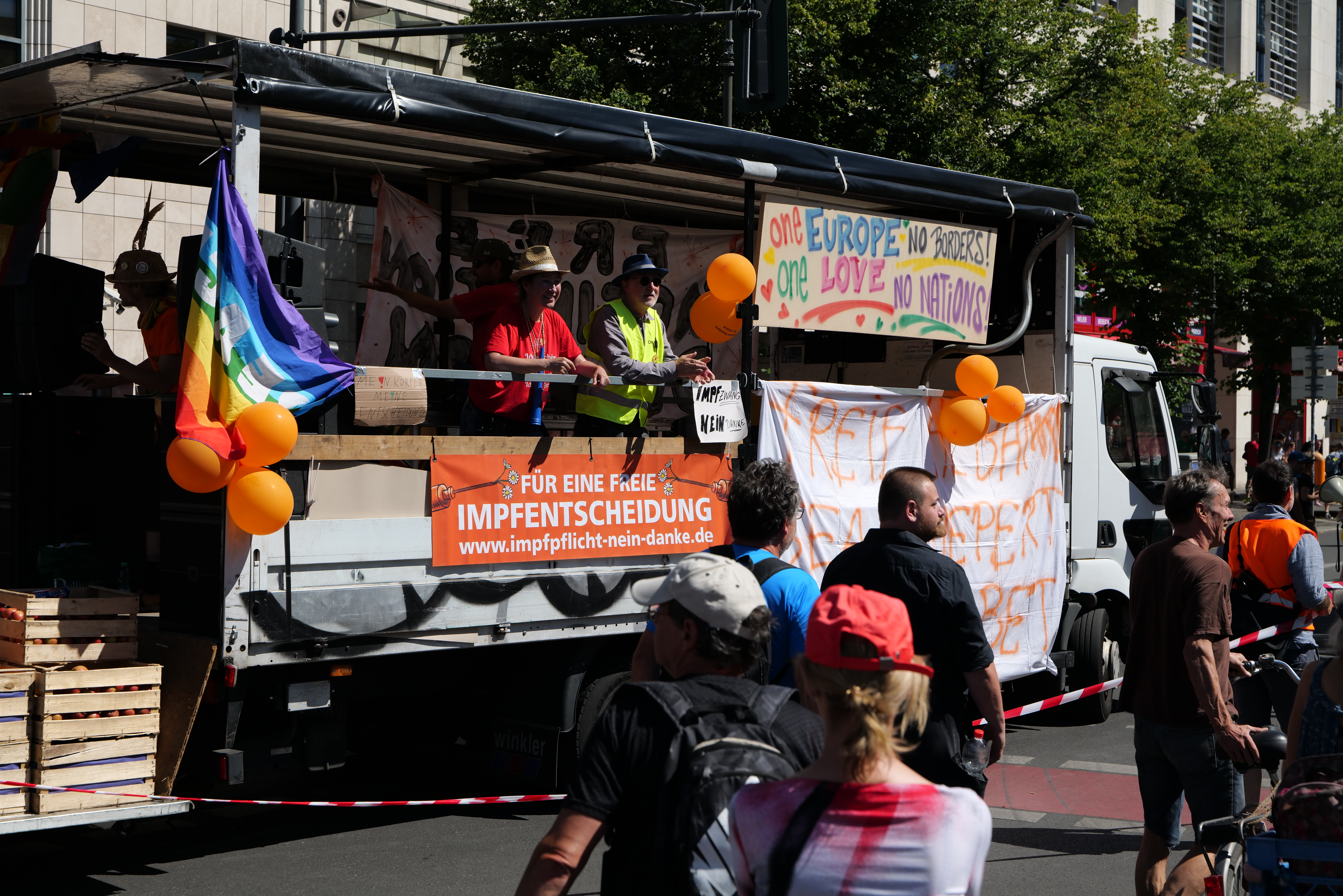 Demonstration von und Verschwörungsgläubigen und Rechtsextremen unter dem Motto „Tag der Freiheit – Das Ende der Pandemie“ gegen die Schutzmaßnahmen gegen das Coronavirus, gegen die bei der Demonstration demonstrativ verstoßen wurde, was zur formalen Auflösung der Demonstration und anschließenden Kundgebung führte am 1. August 2020 in Berlin.